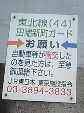 JR東日本田端新町ガード看板